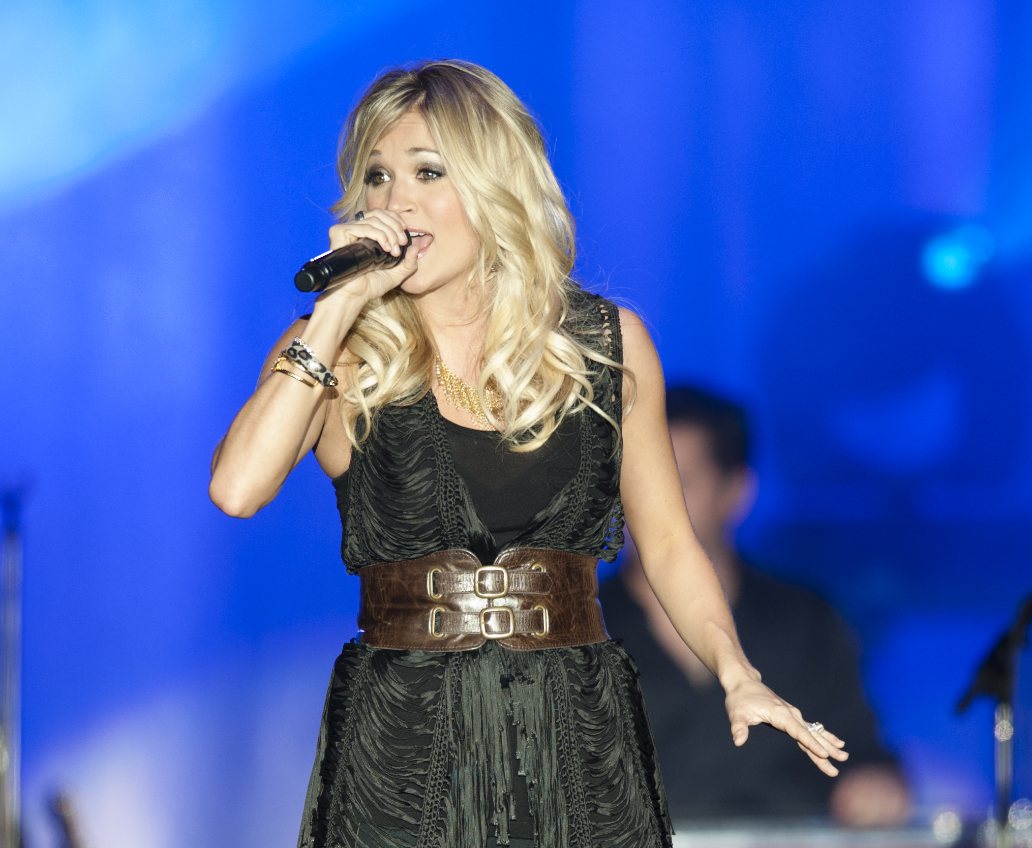 Carry Underwood_39